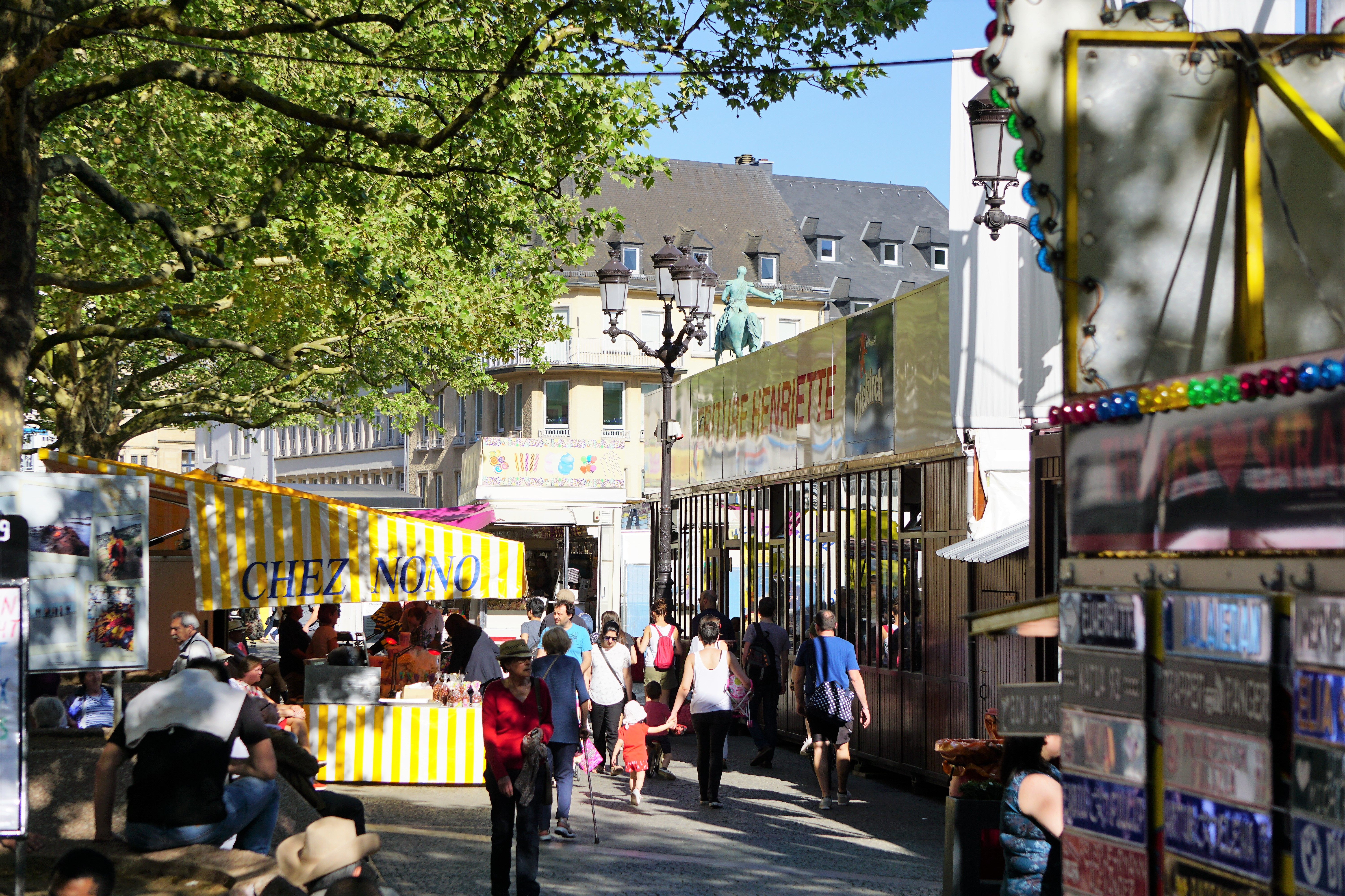 Luxembourg. L'Oktavemäertchen, marché traditionnel qui trouve ses origines dans l'Octave, la fête religieuse la plus importante du Grand-duché de Luxembourg.